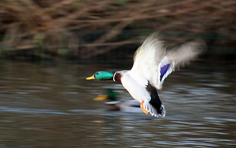 Mallard flying